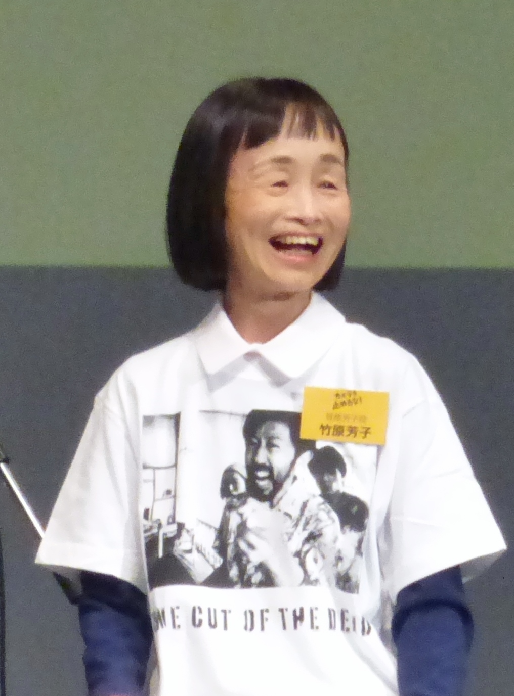 竹原芳子（どんぐり）（2018年11月22日、Zeppダイバーシティ東京「最高かよ〜！『カメ止め！』アツアツ感染者集会〜ポンデミック2018〜」）